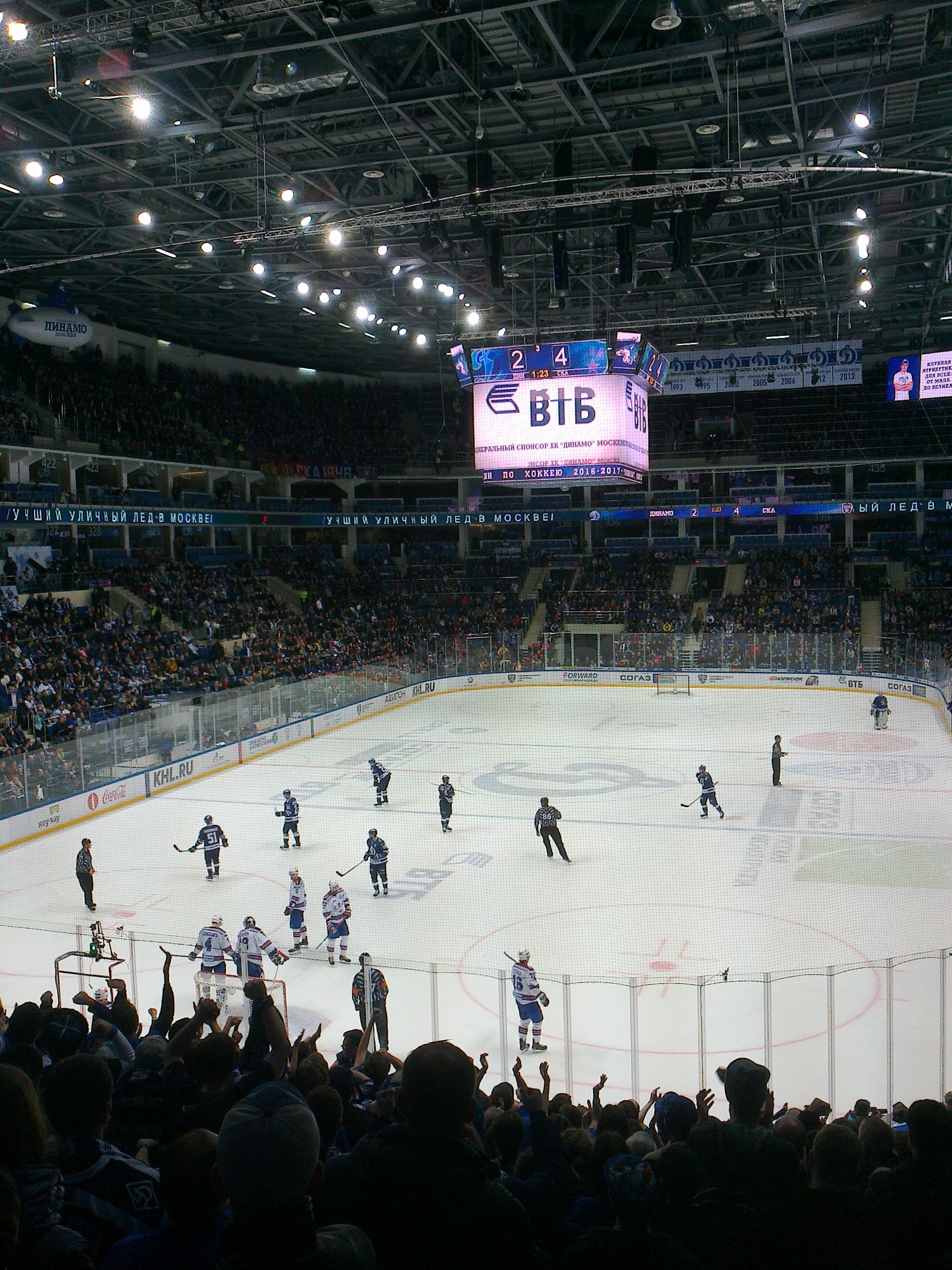 Окончание третьей игры матча Динамо Москва - СКА